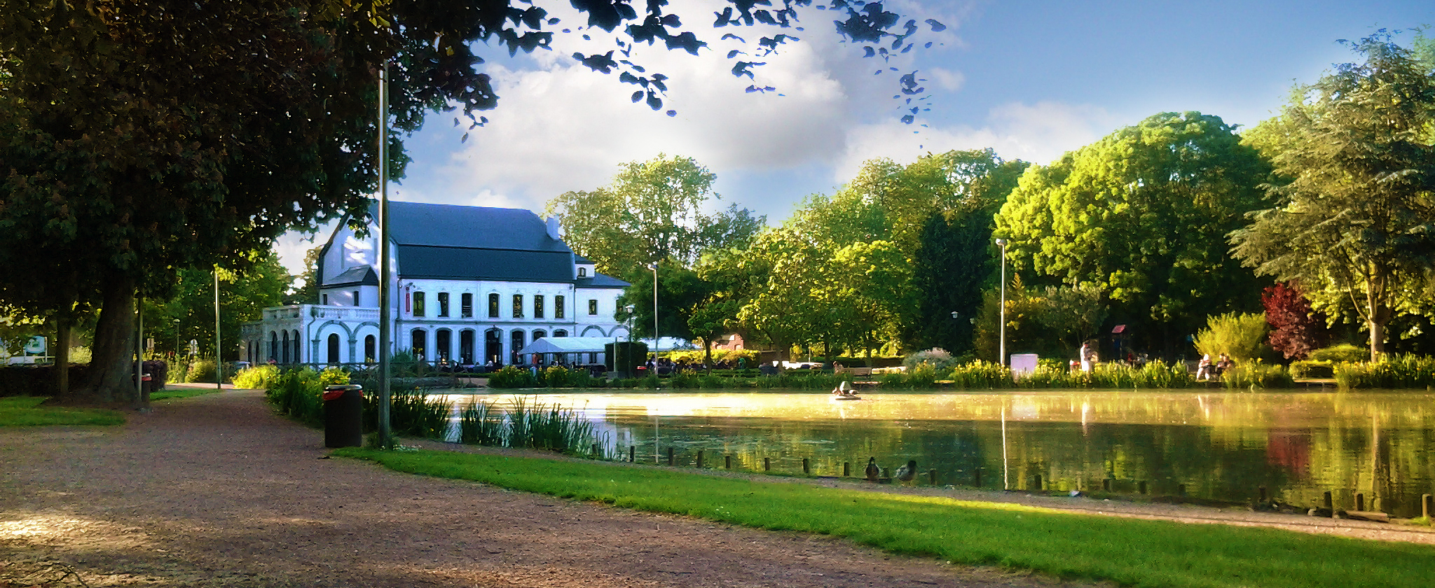 Photo du parc de Jemappes (Château Guillochain)